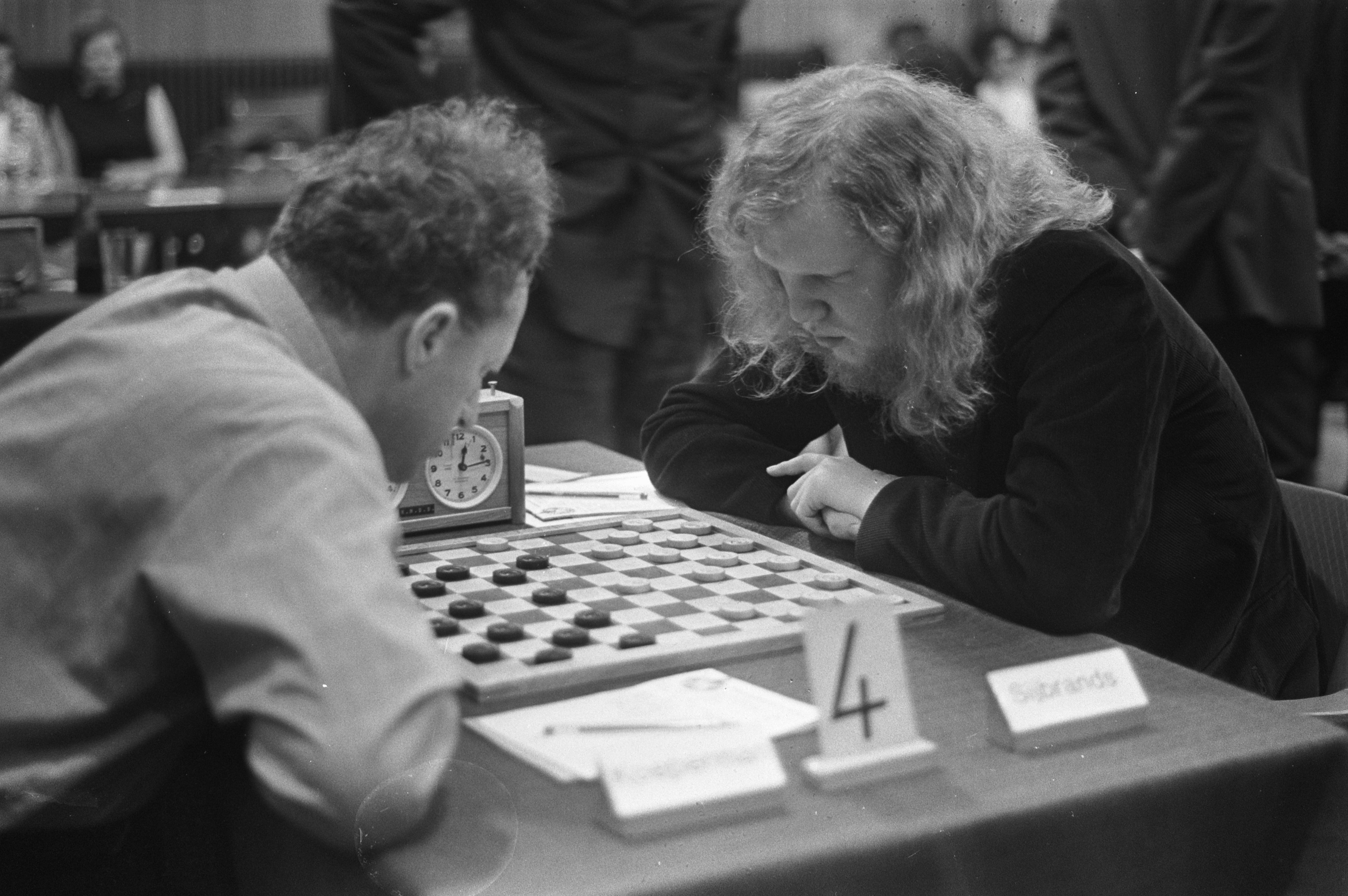 Koeperman tegen Sybrands